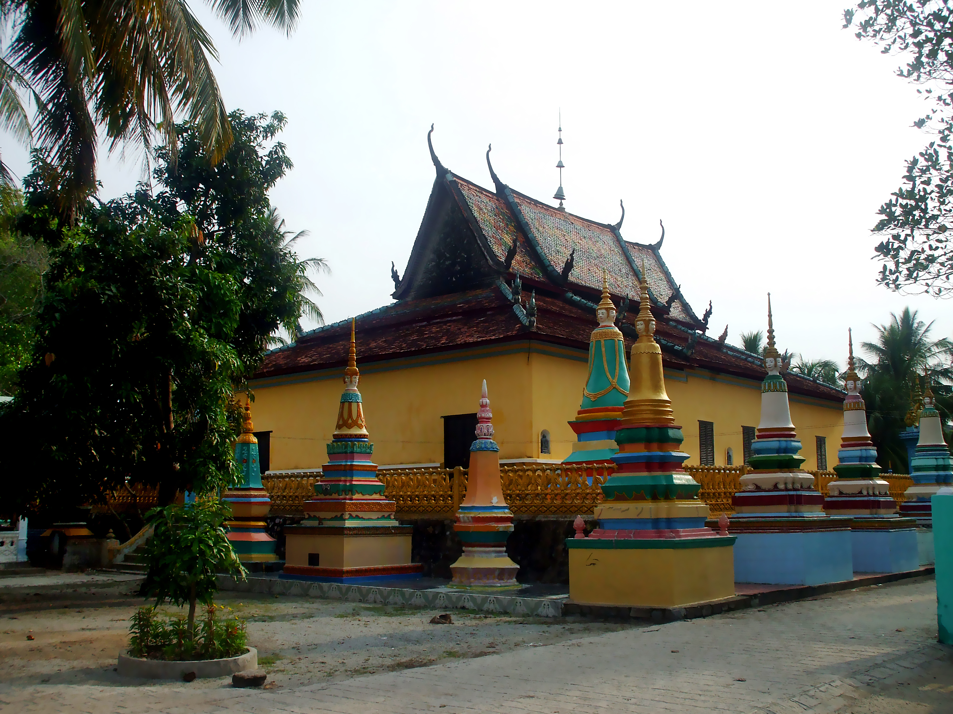 Chùa Xà Tón (Xvayton) ở trung tâm huyện lỵ Tri Tôn, tỉnh An Giang. Đây là ngôi chùa của người Khmer.